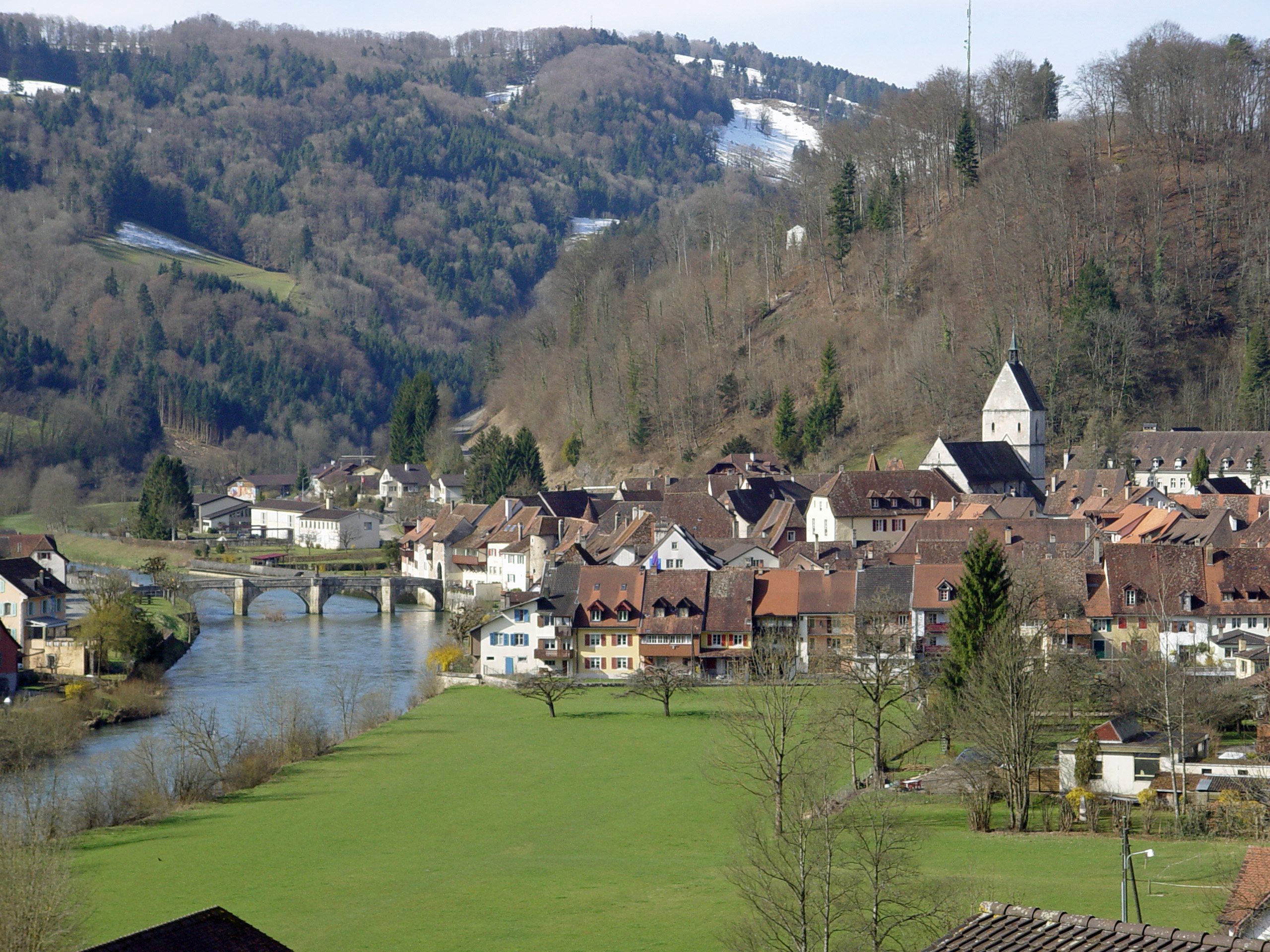 Stadt St. Ursanne an Doubs im Kanton Jura von Bahnhofstrasse gesehen